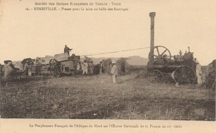 Presse pour la mise en balle des fourrages, Henriville (actuelle El Alem), gouvernerat de Kairouan, Tunisie